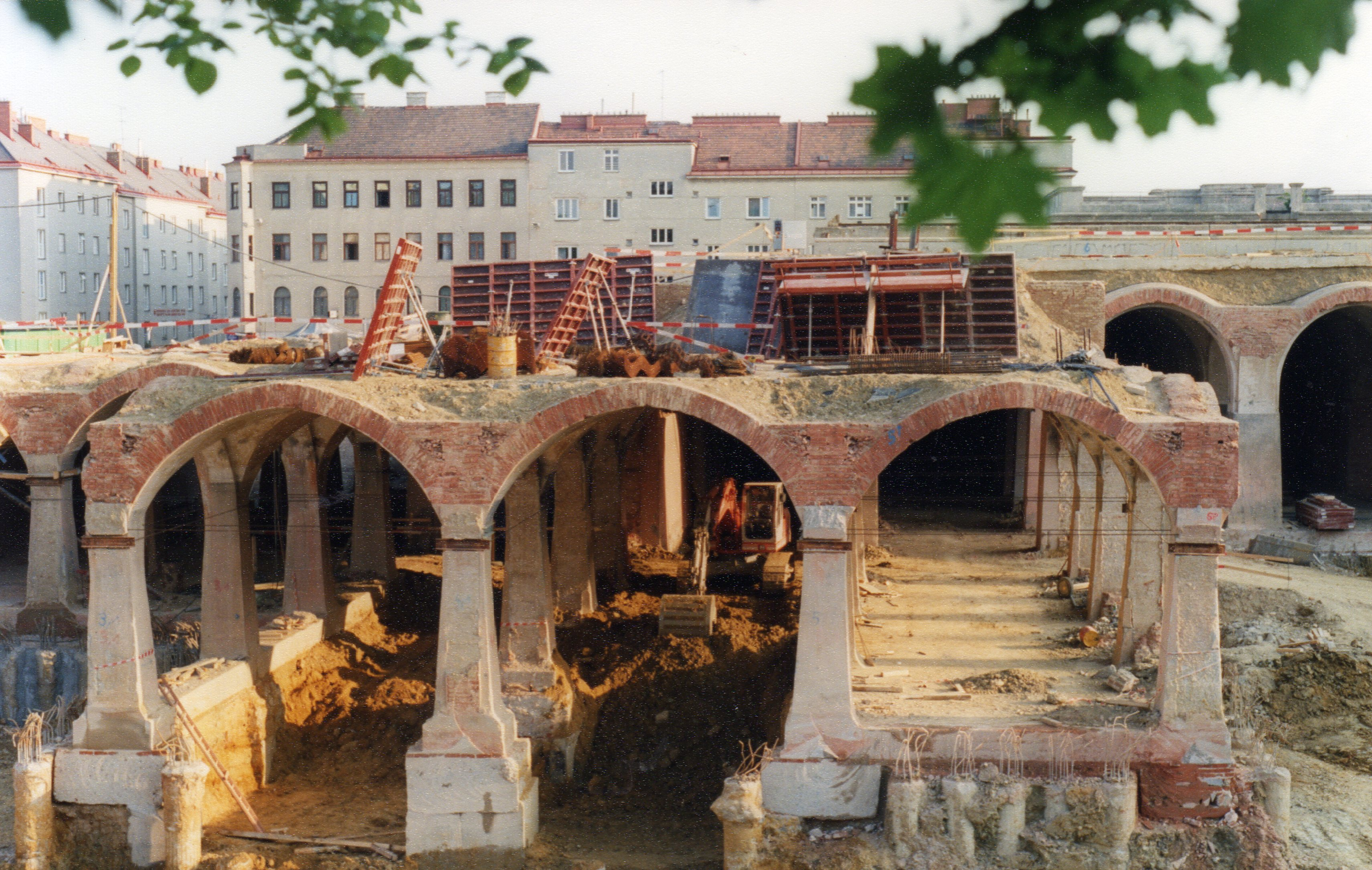 Wiener Wasserbehälter Meiselmarkt im Umbau zu Shopping Center